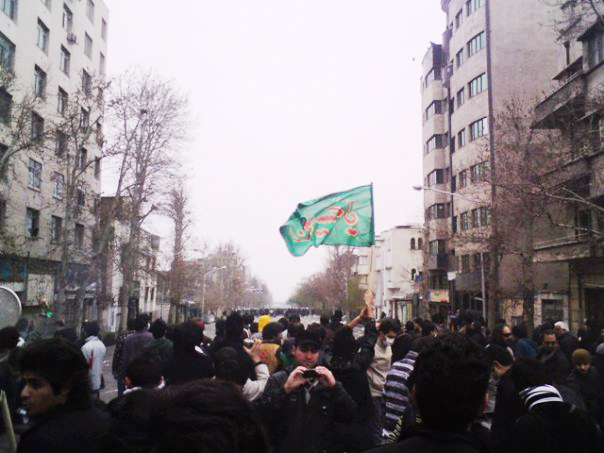 معترضین در برابر صف عظیم موتور سواران یگان ویژه و پیاده‌های لباس شخصی در روز عاشورا